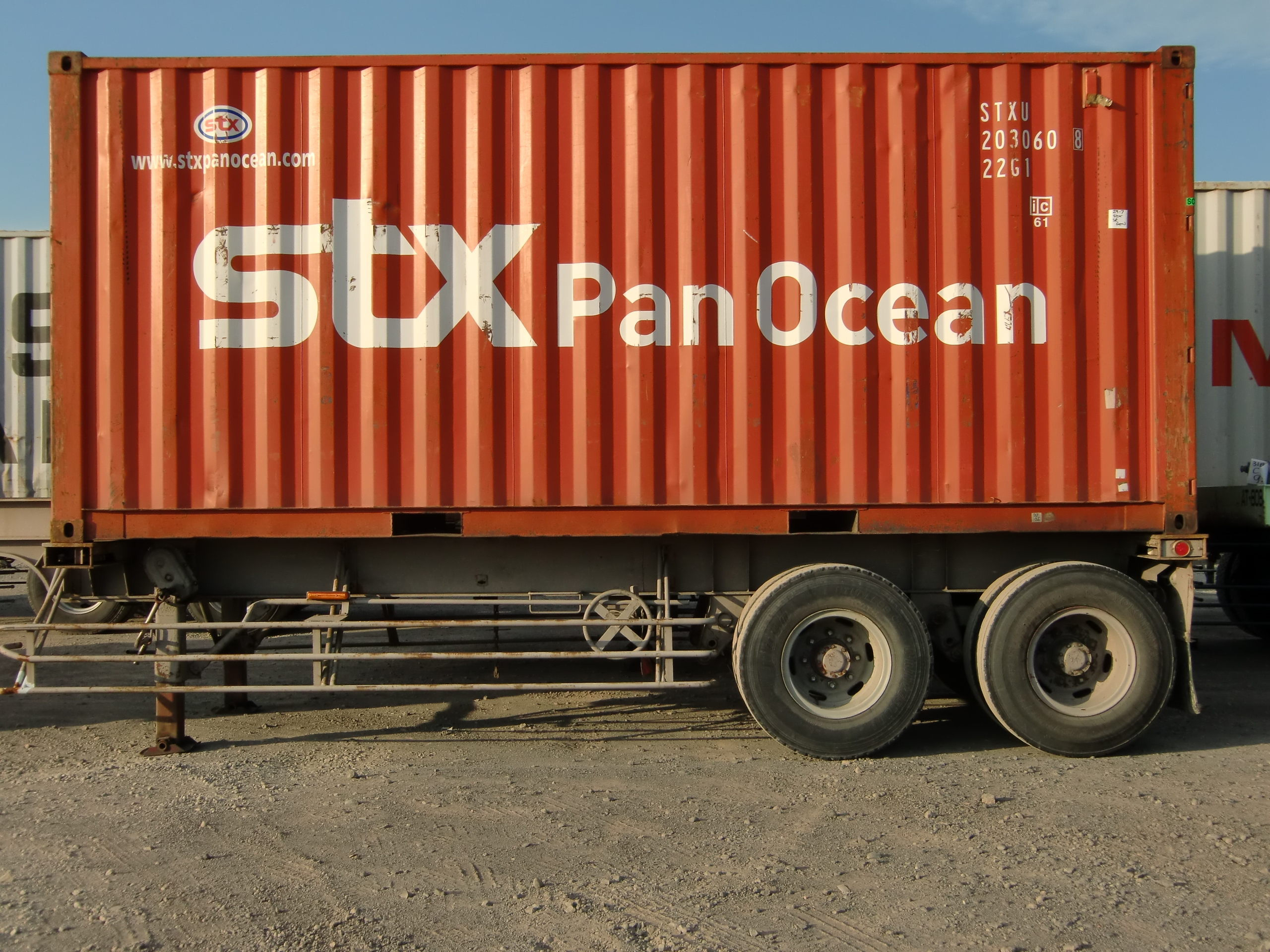 関連資料画像。 愛知県／飛島埠頭